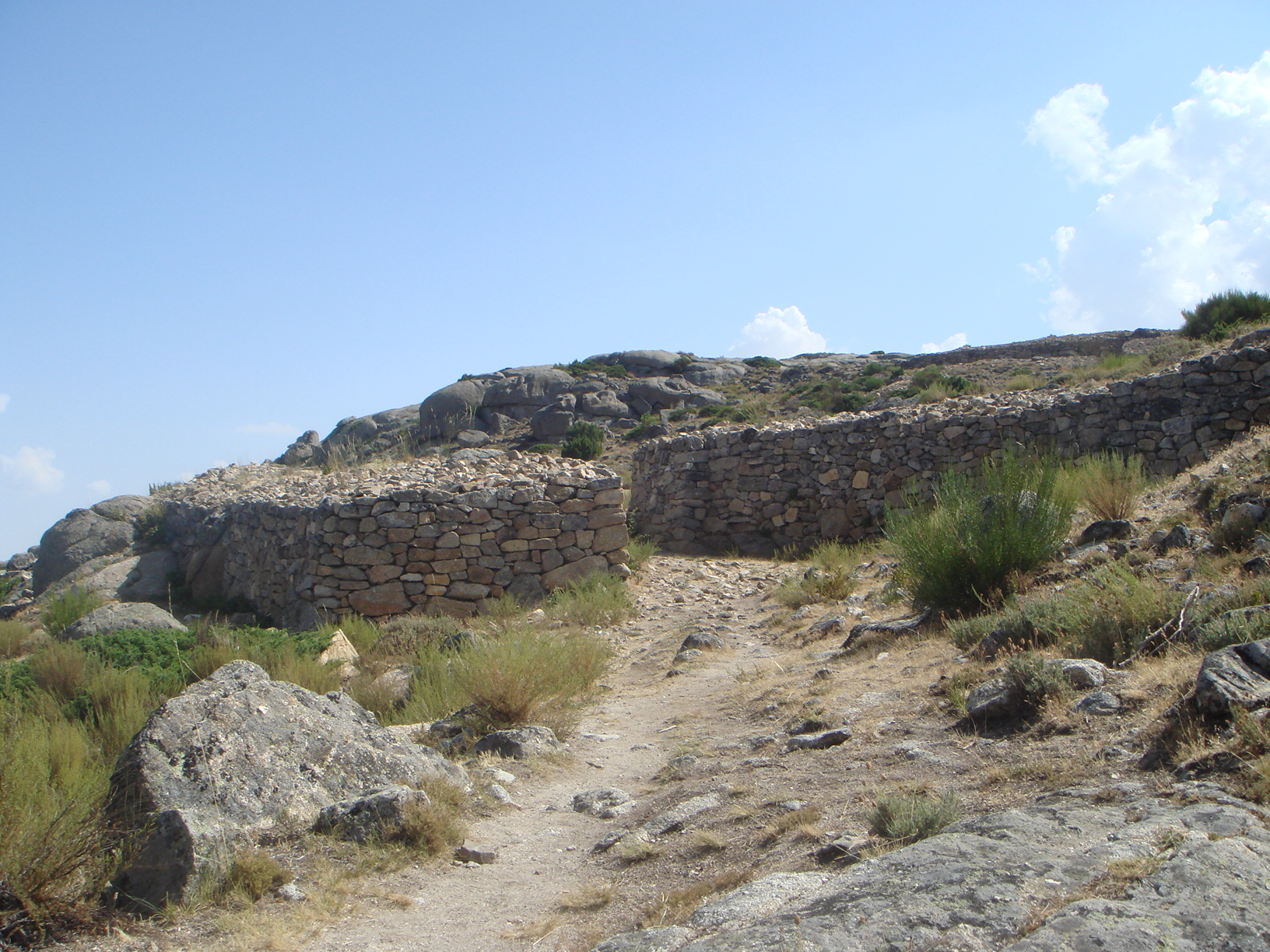 Puerta oeste de las murallas del Castro de Ulaca, Villaviciosa, (Ávila), España